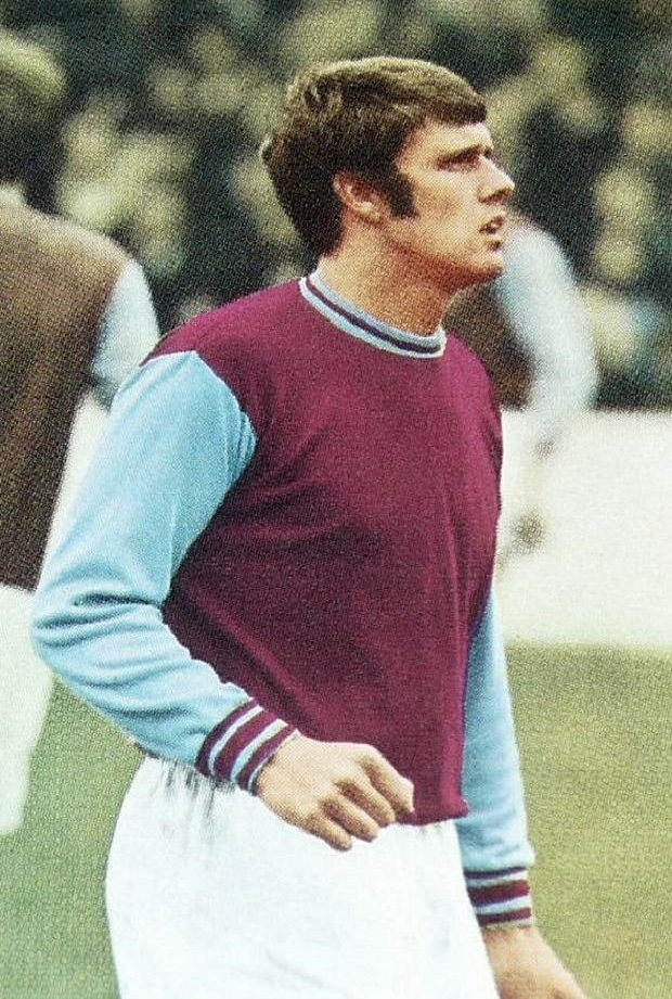 Geoffrey Hurst à Hest Ham United, en 1969 - PANINI FOOTBALL ENGLAND 1970-1971 n°311